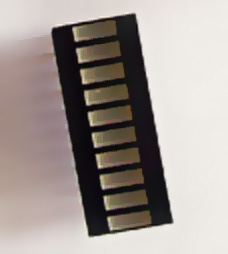 Светодиодный дискретный шкальный индикатор на 10 разрядов